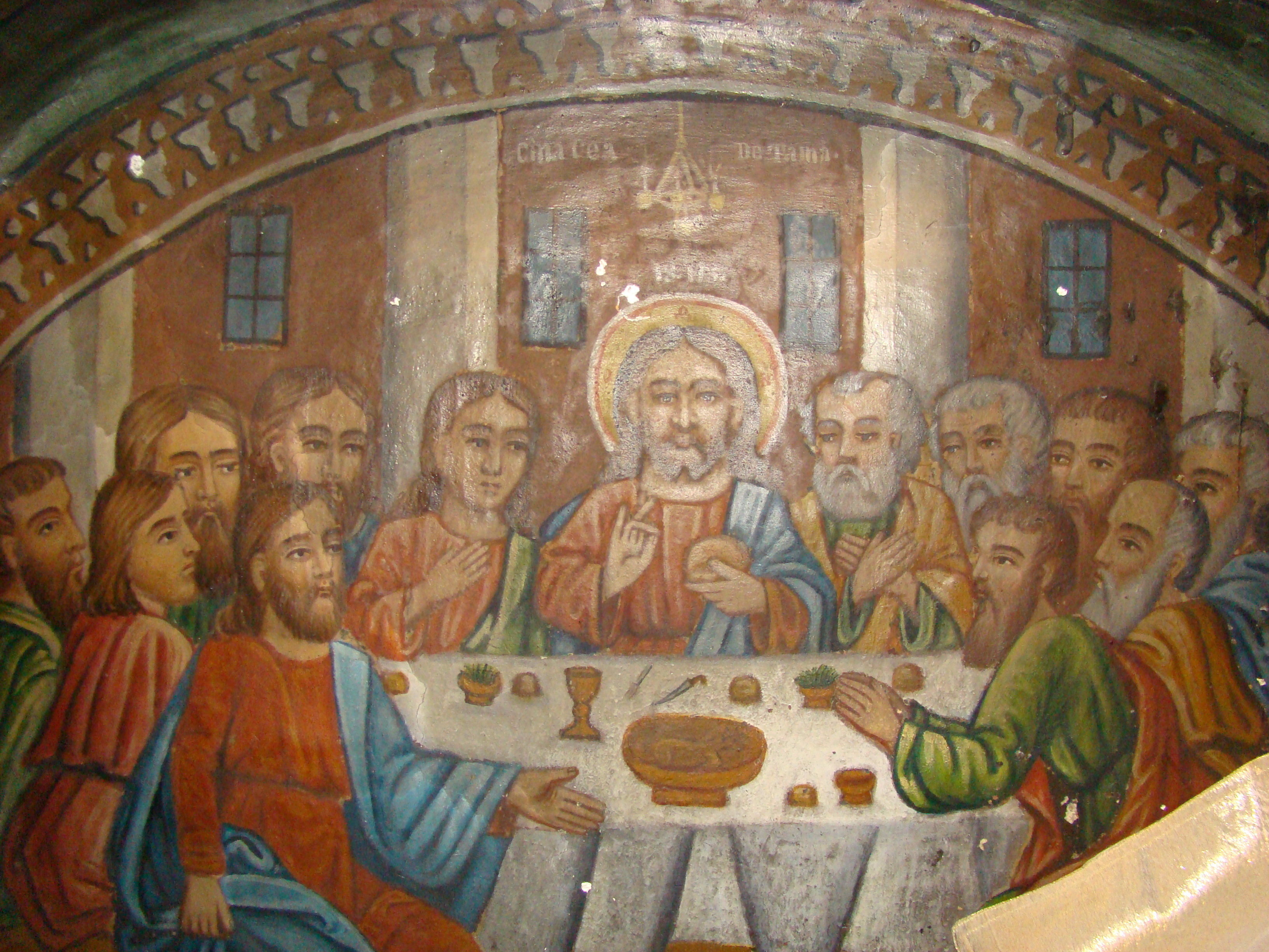 Biserica de lemn „Buna Vestire”, sat Bărbătești, cătun Iernaticu, Vâlcea